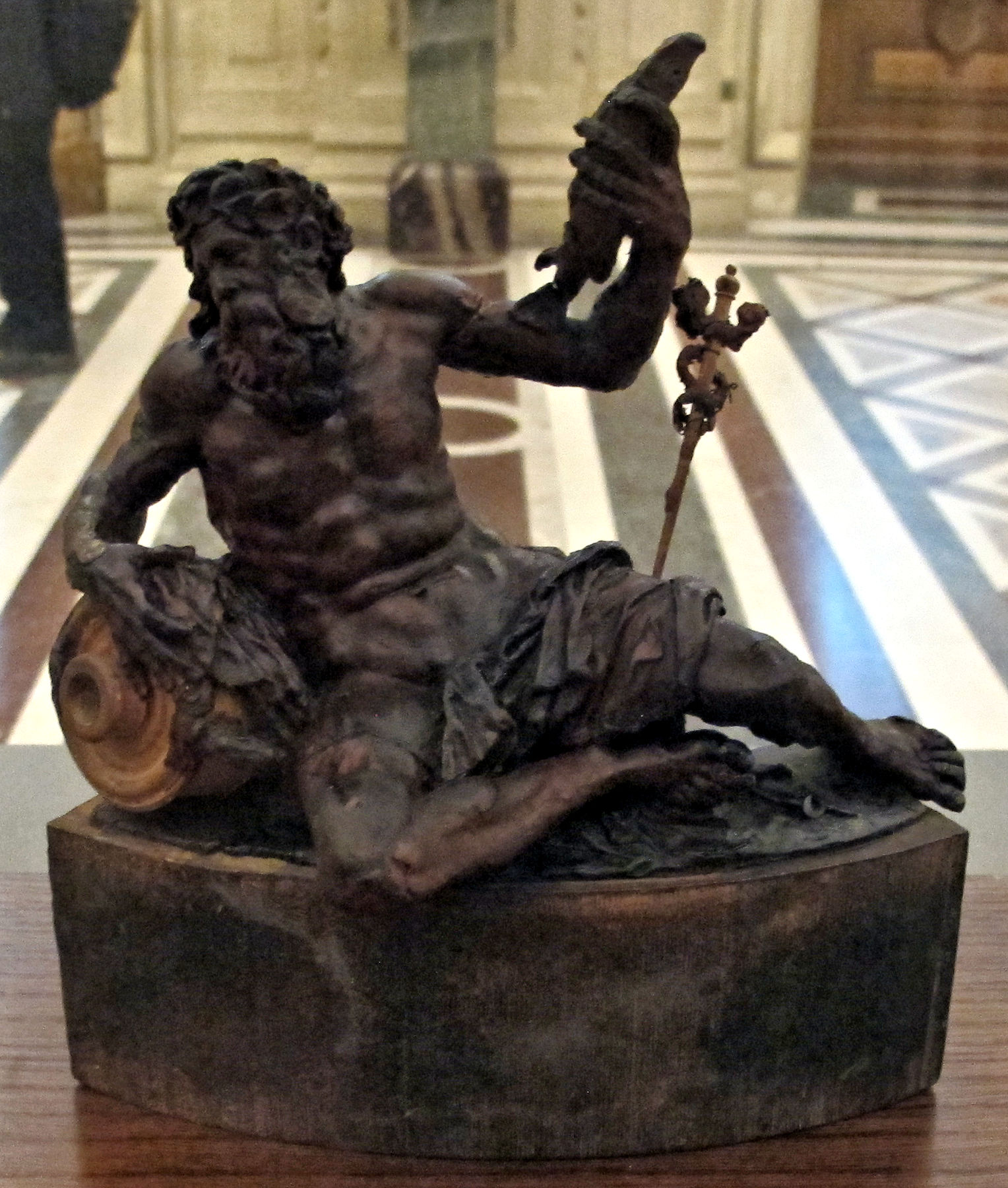 scultura italiana al Louvre